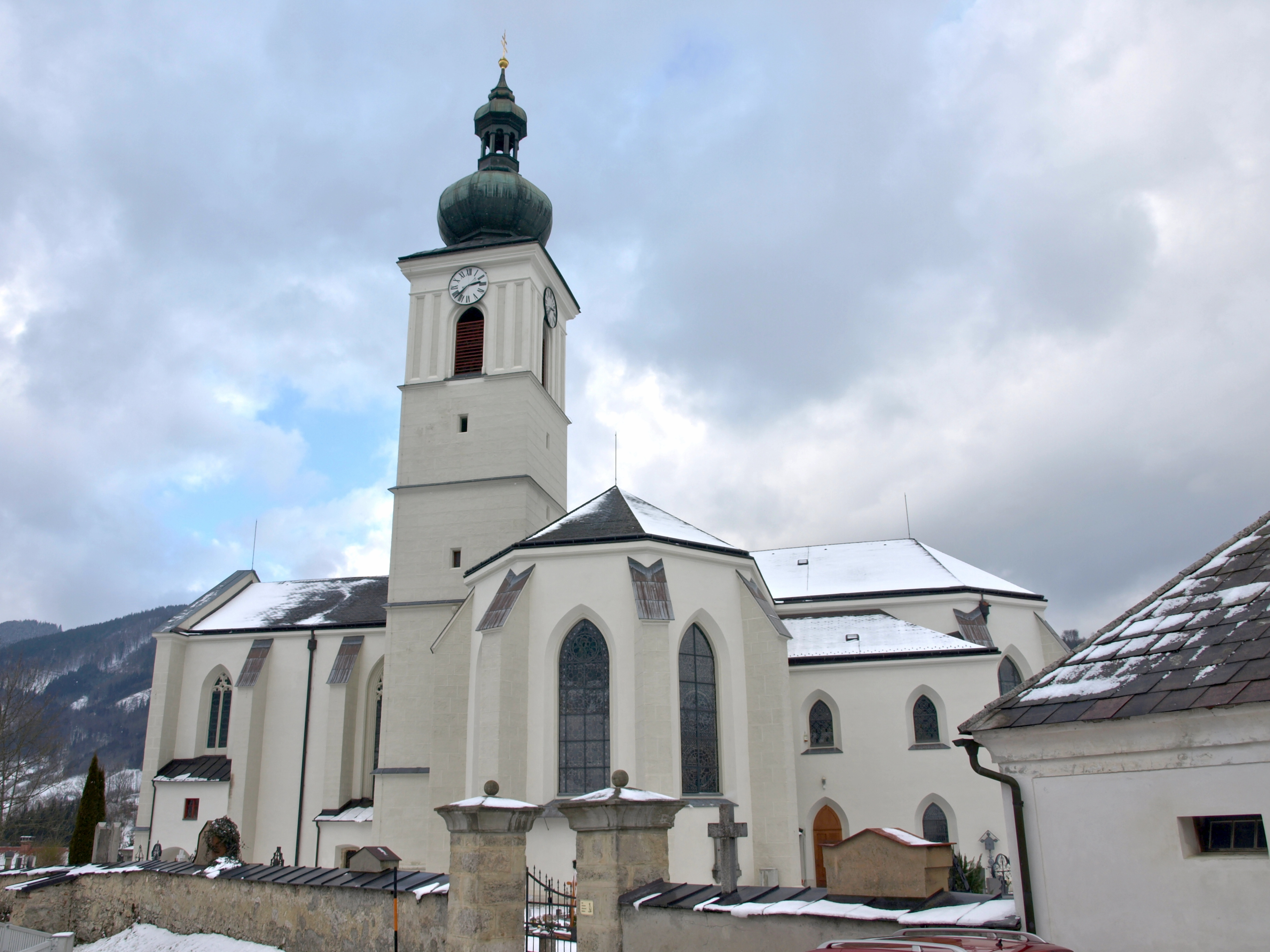 Kath. Pfarrkirche hl. Johannes Evangelista